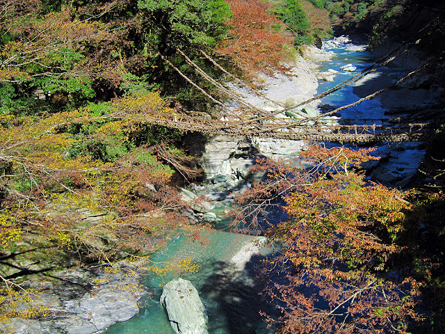 紅葉とかずら橋 - 一 （三好市 祖谷のかずら橋） Kazurabashi (Iya) in autumn 22 Nov, 2011